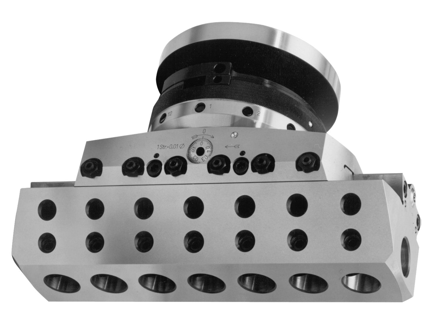 Universal Plan- und Ausdrehkopf von Wohlhaupter (UPA7-S8)